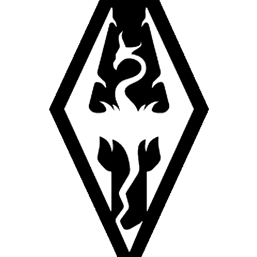 Скайрим иконка